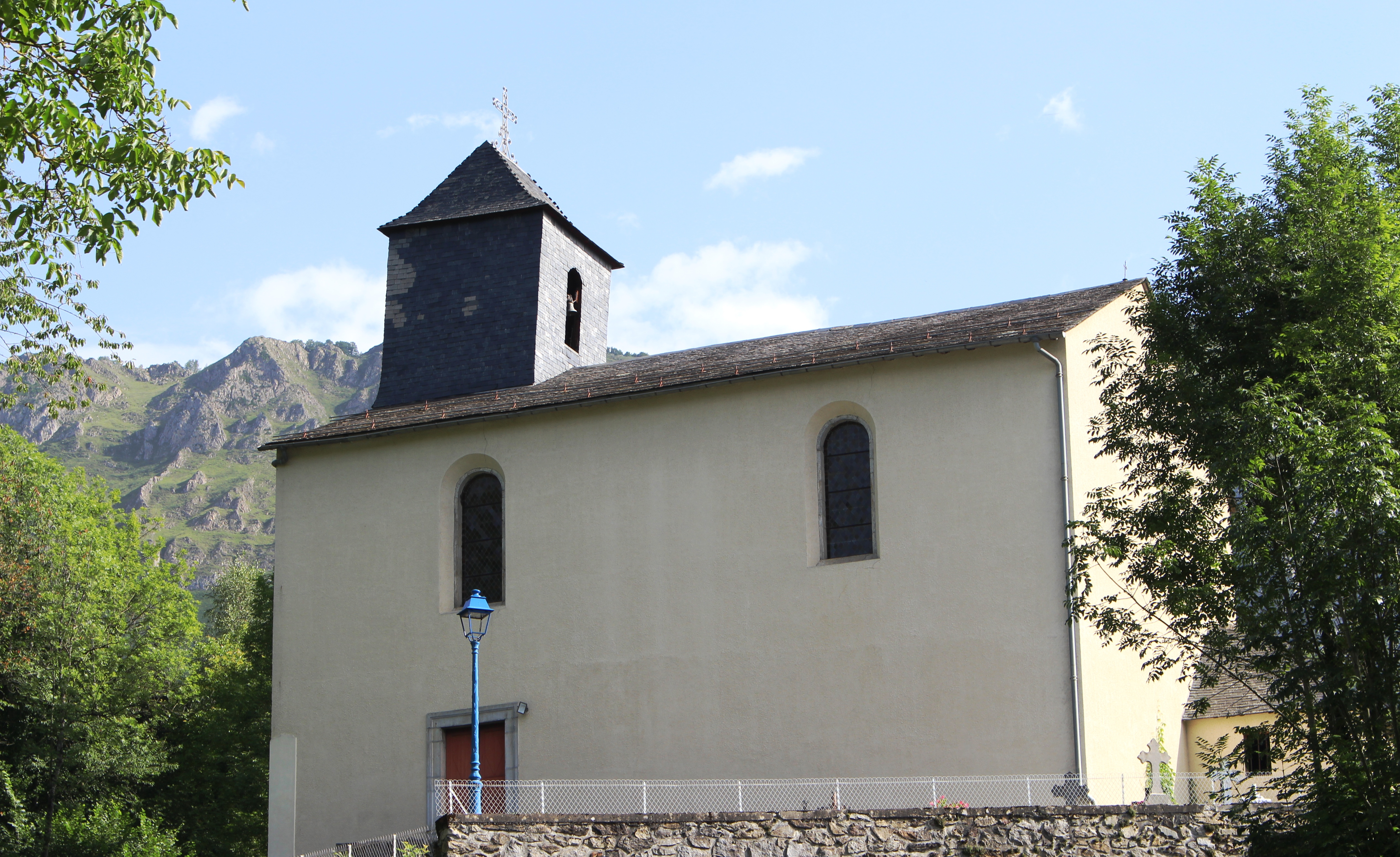 Église Saint-Martin de Gaillagos (Hautes-Pyrénées)